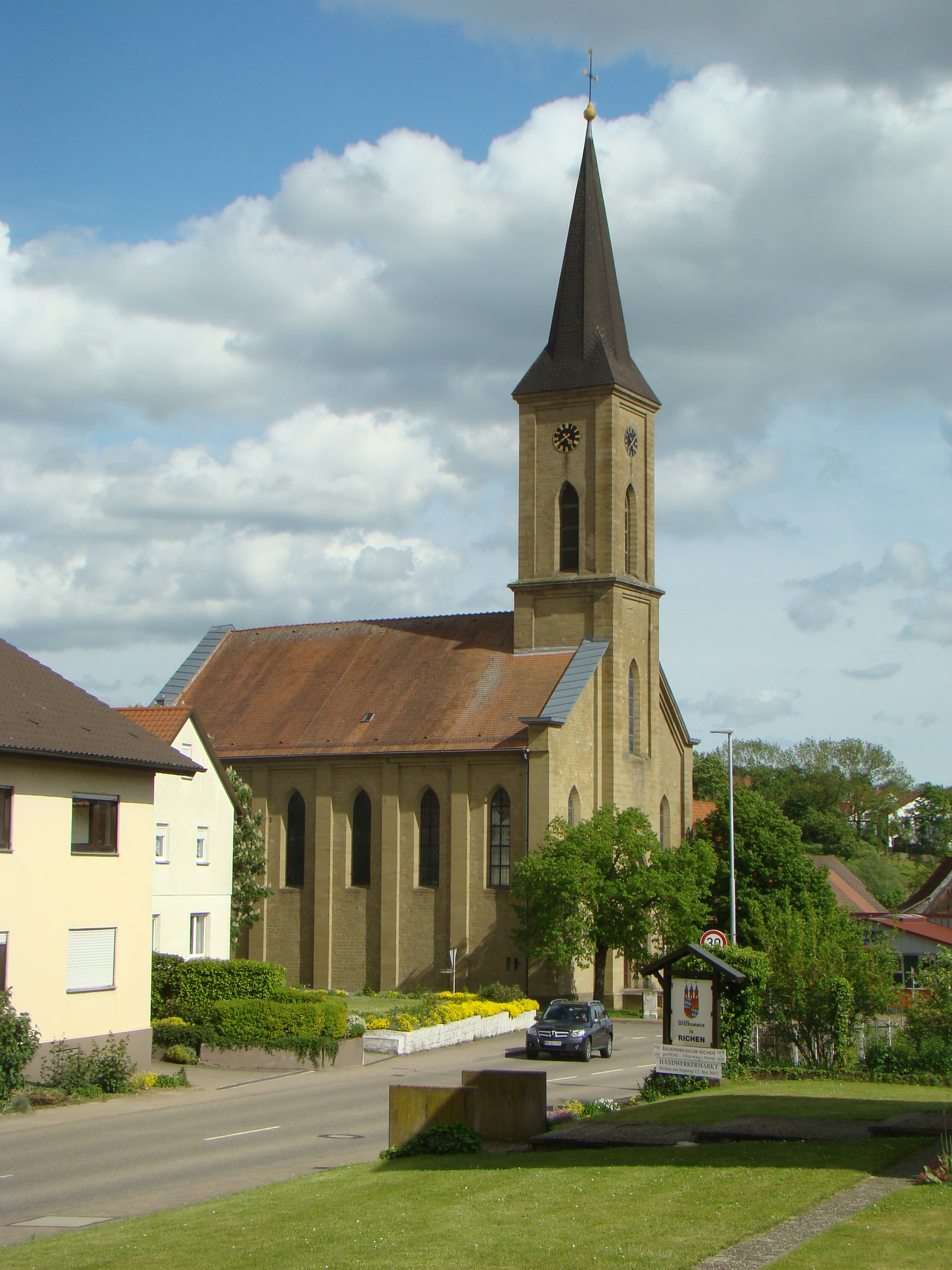 Evang. Kirche in Eppingen-Richen